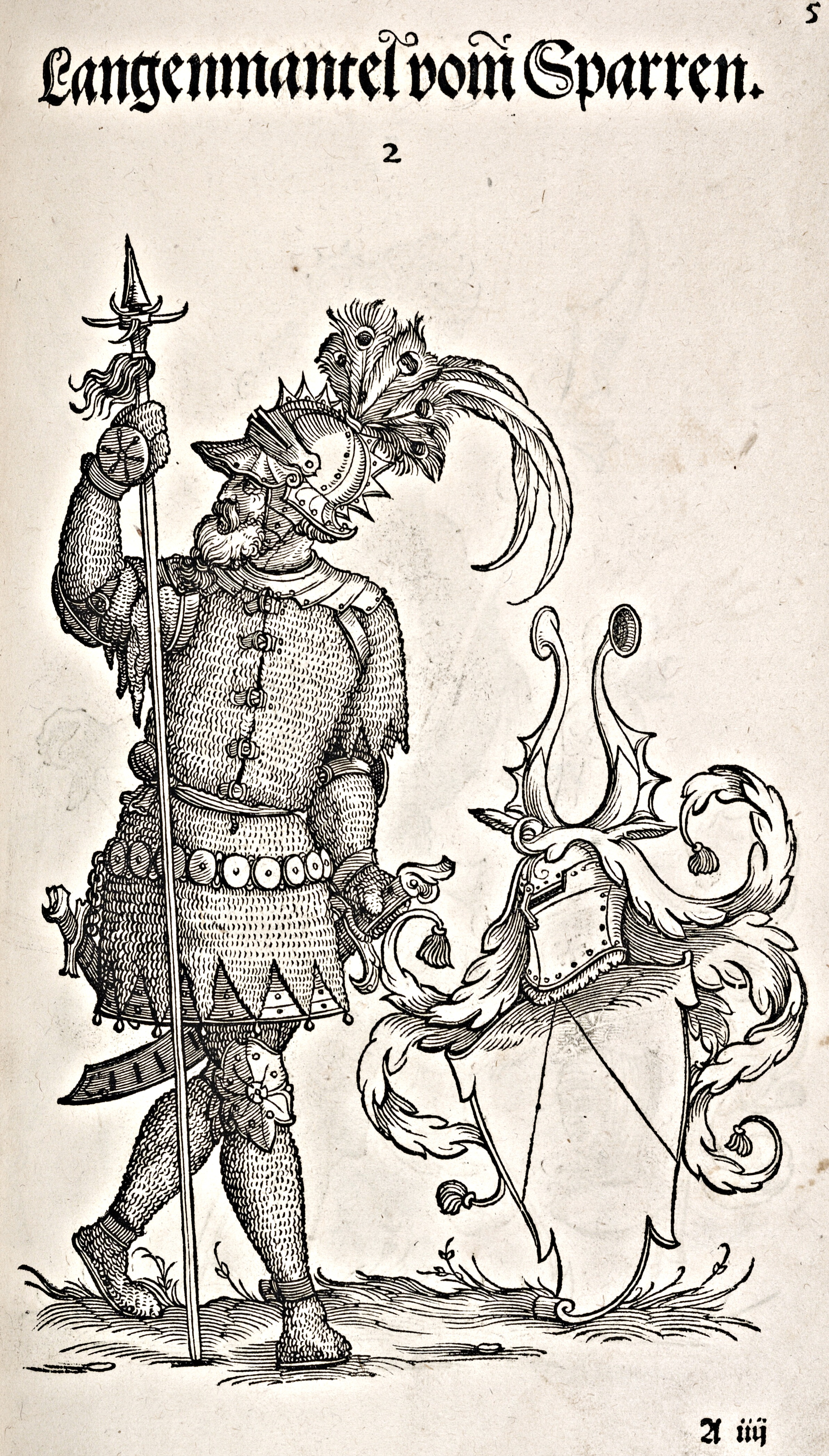 Titelseite der Langenmantel vom Sparren, aus: Bericht vnd Antzaigen der loblichen Statt Augspurg aller Herren Geschlecht, so vor fünfhundert vnd mehr Iaren ... daselbst gewont, vnd bis auf achte abgestorben, 1550 (